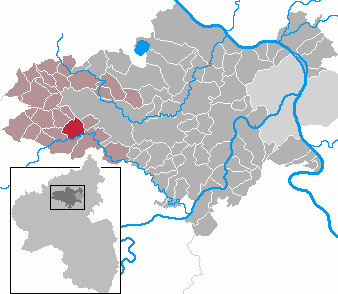 Weiler in Rhineland-Palatinate - district Mayen-Koblenz